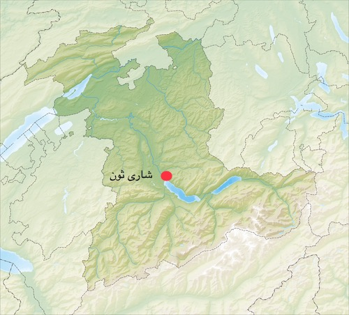 کوردی: شارى ثون لەسەر نەخشە